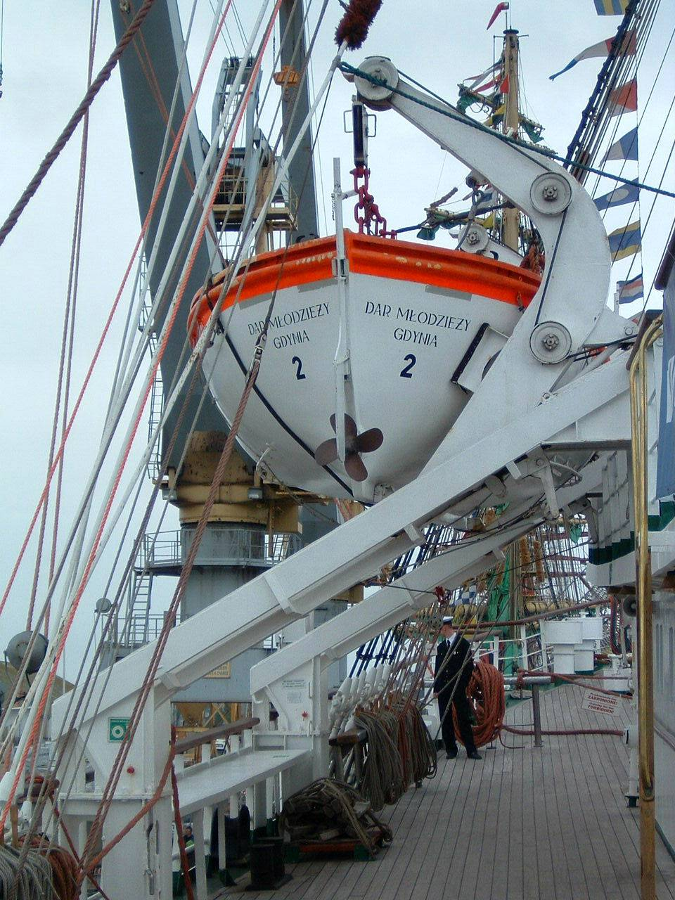 Bossoir à gravité. Source: Clipper